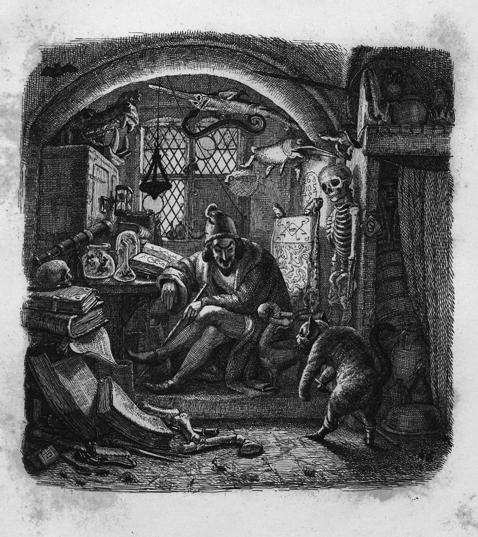 Illustration zu Das Märchen vom gestiefelten Kater, in den Bearbeitungen von Straparola, Basile, Perrault und Ludwig Tieck. Leipzig, Brockhaus, 1843.